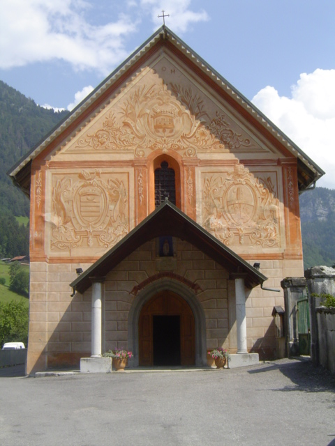 Façade de l'église. Créée en 1680, restaurée en 1890 puis en 1987.